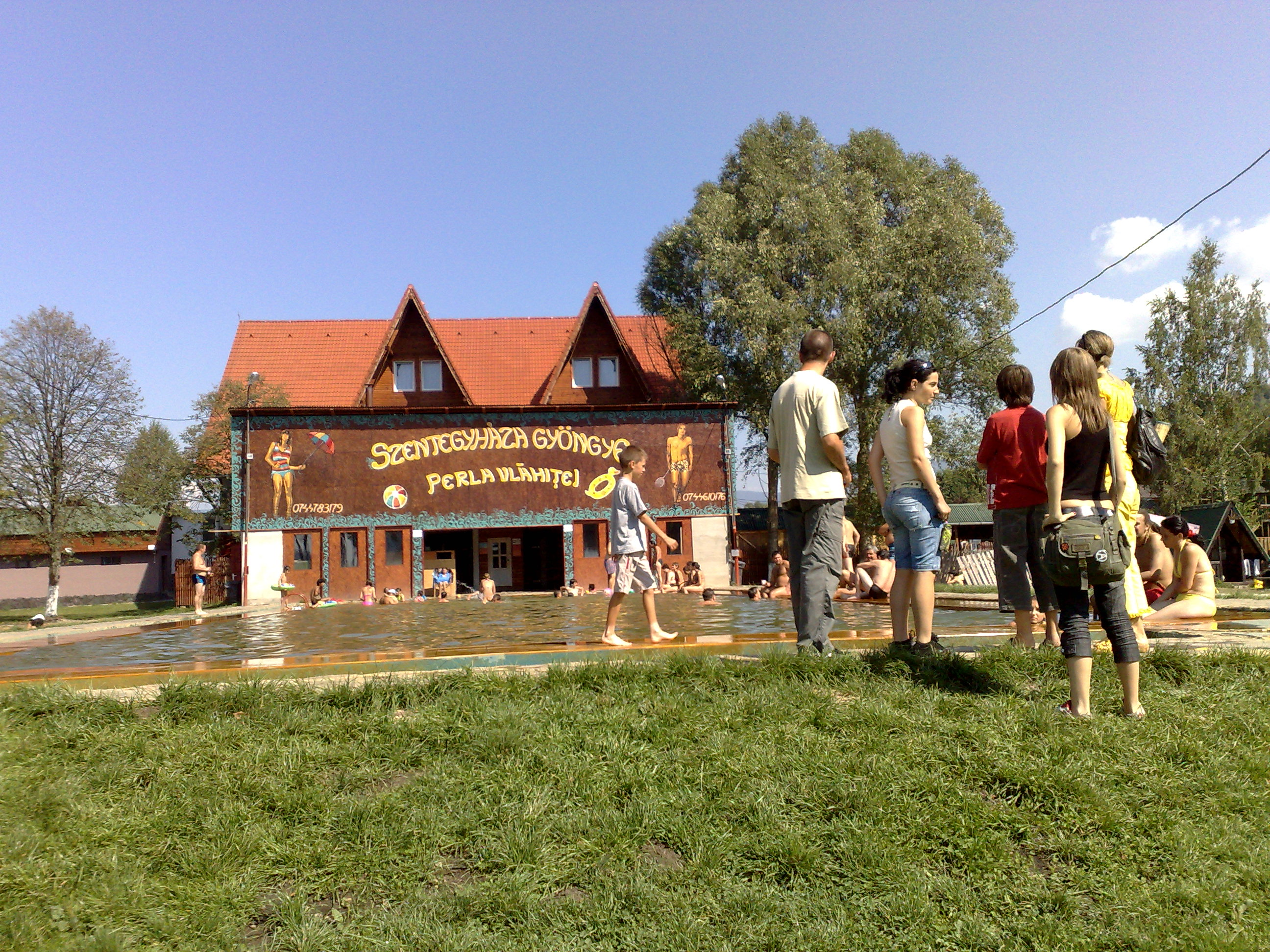 Szentegyháza Gyöngye